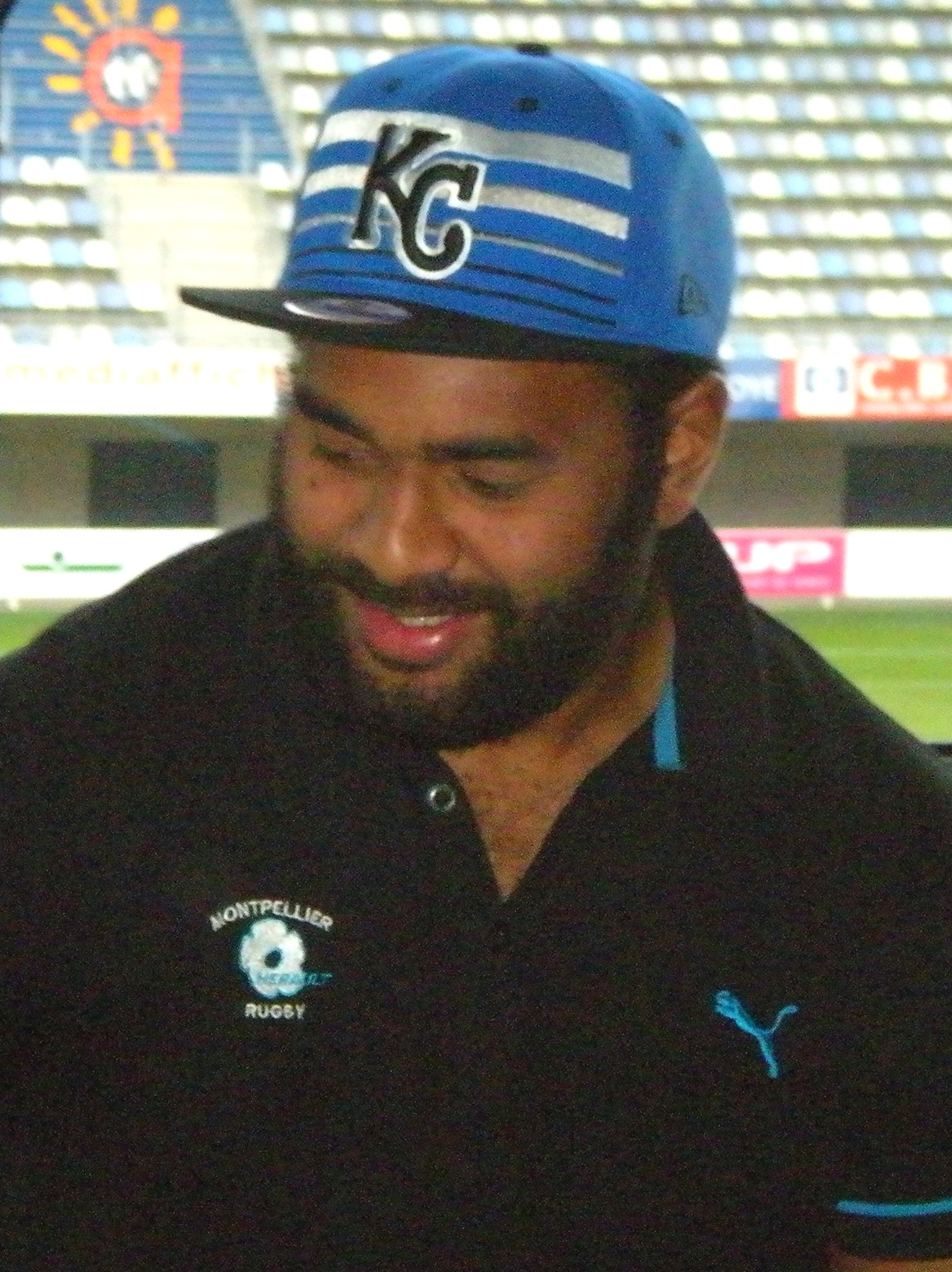 Timoci Nagusa, décembre 2012.